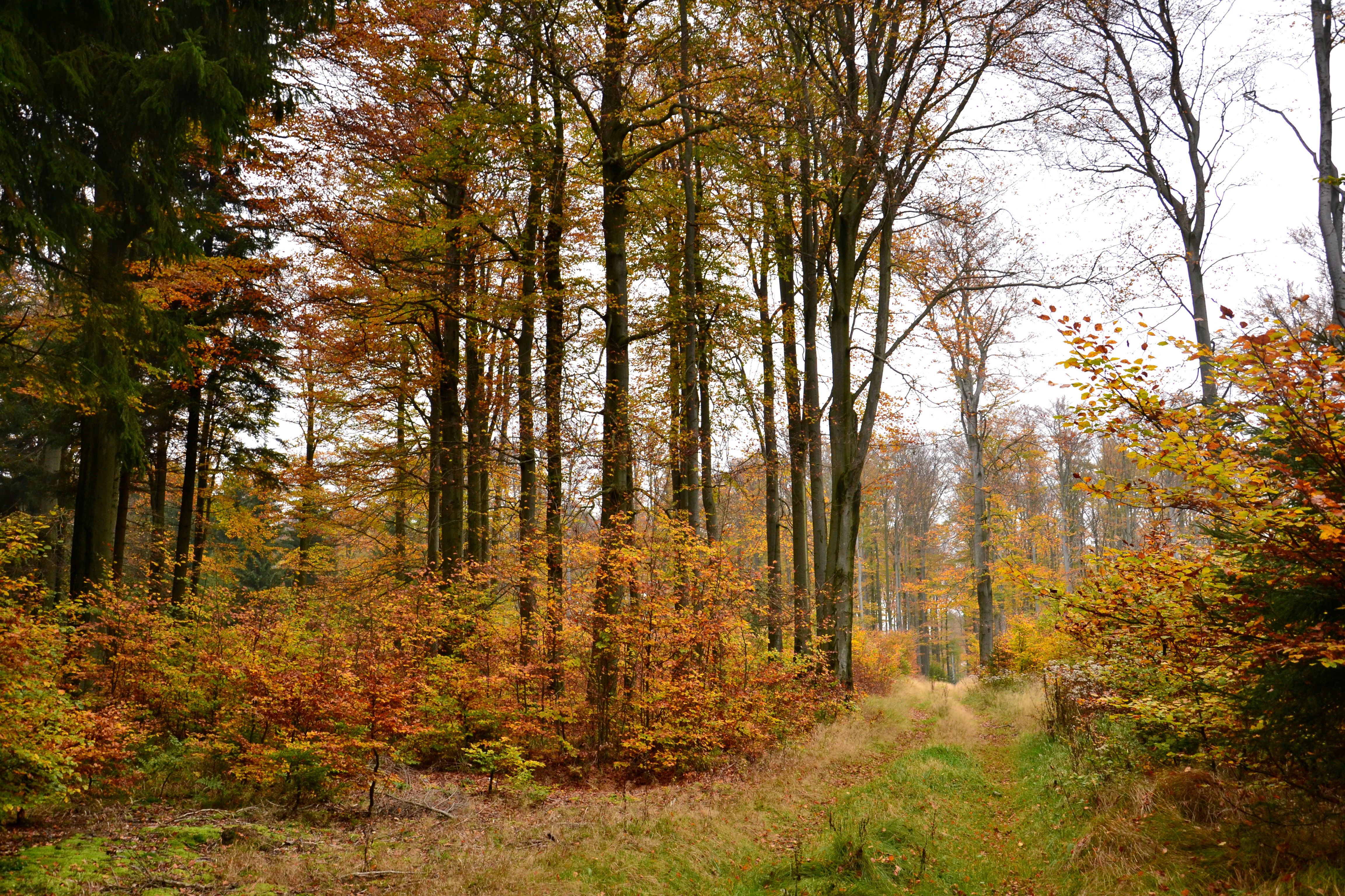 Bučina na Kienhaidě - les